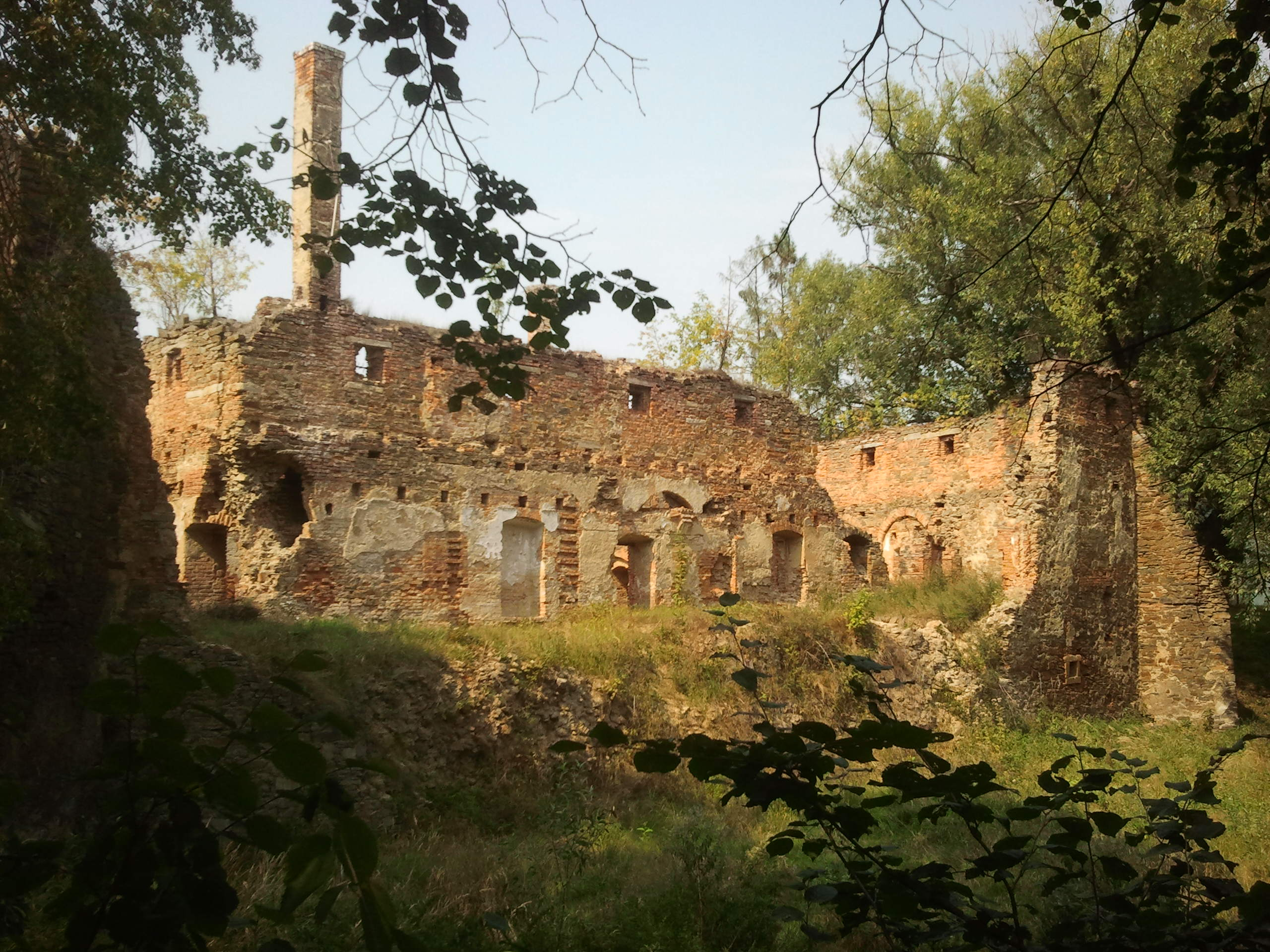 Tvrz se sýpkou, zřícenina (Velká Polom), Velká Polom 50